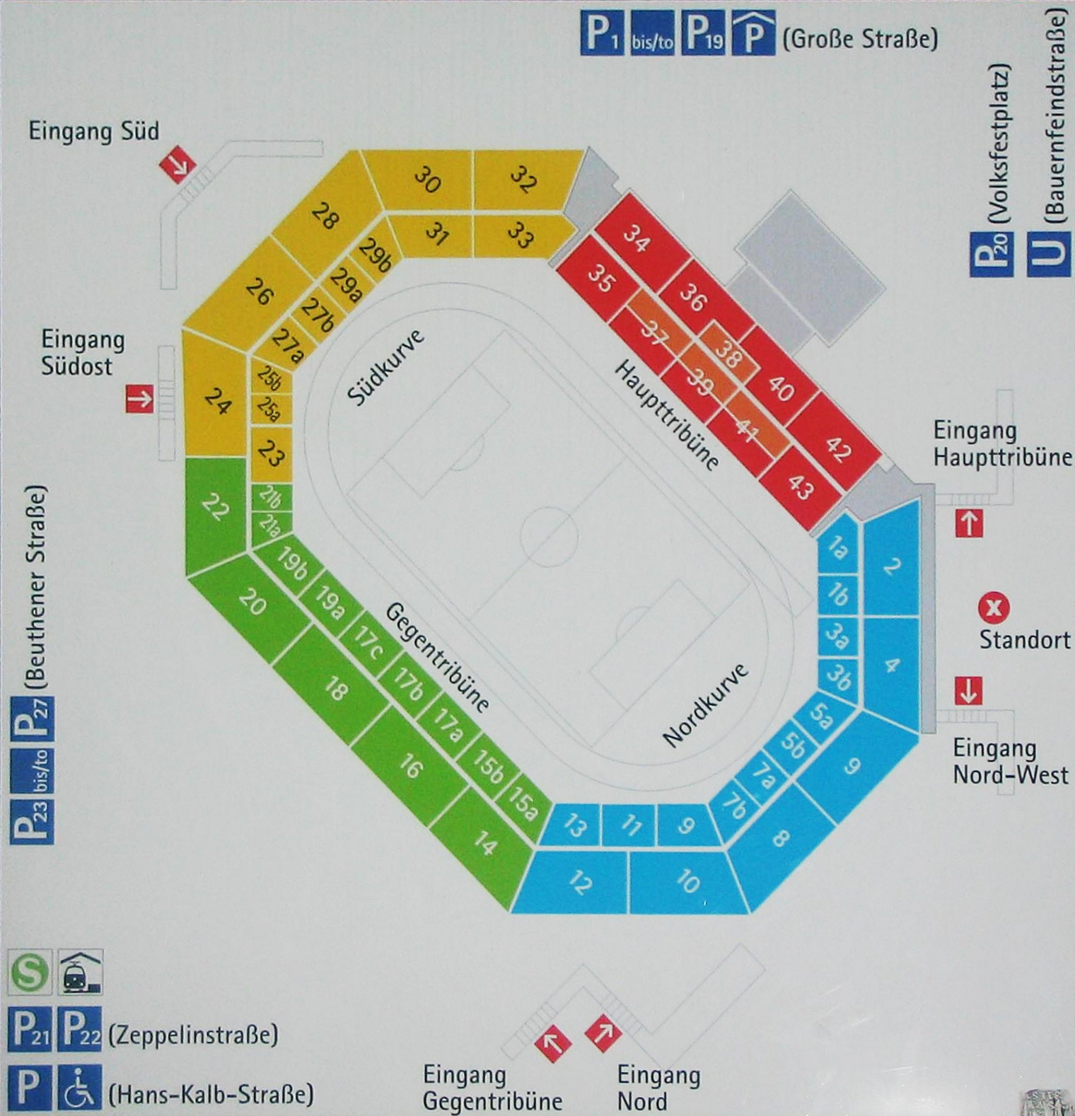 A map of Frankenstadion